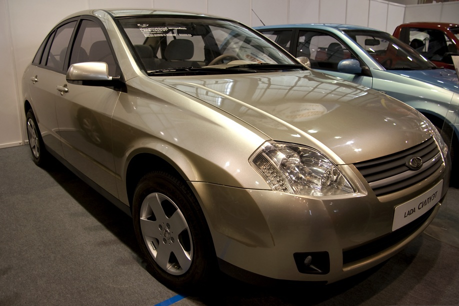 Прототип автомобиля Лада Силуэт. 15-й Тольяттинский автосалон. Сентябрь 2010, Тольятти, Россия